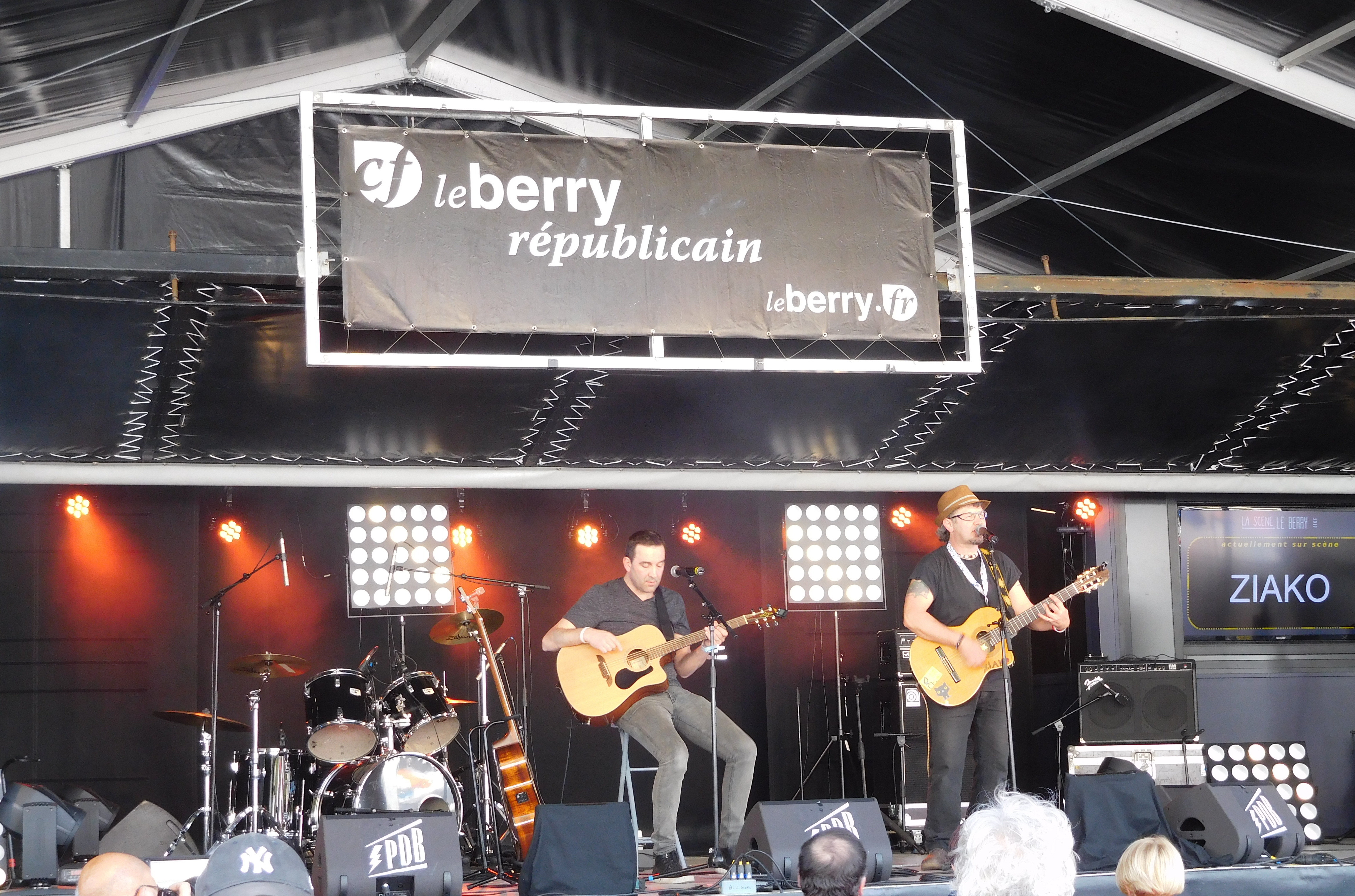 Ziako, duo folk chant/guitare, scène Le Berry (place Miles-Davis, rives d'Auron).